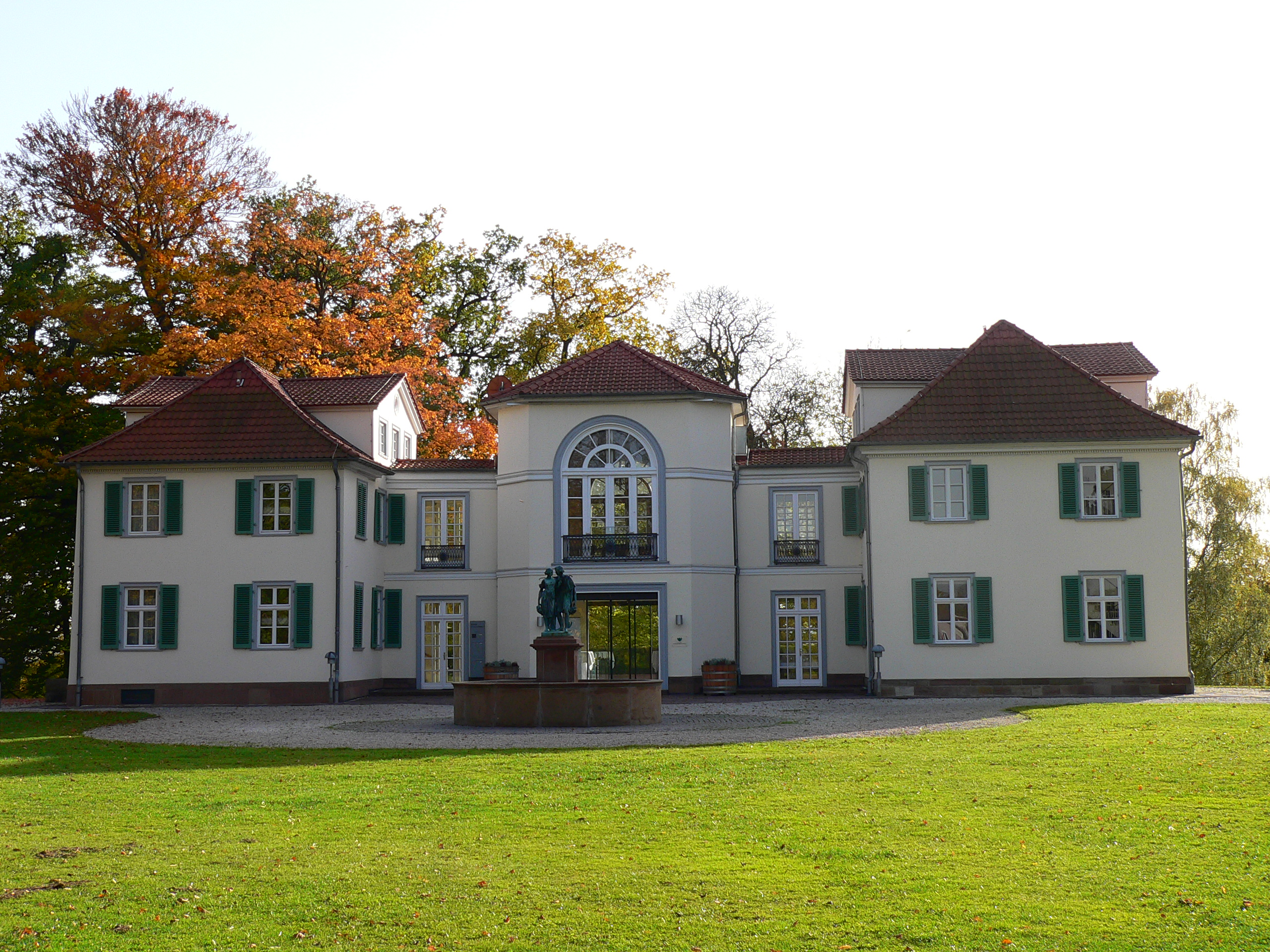 Schloss Schönfeld in Kassel-Wehlheiden, Hessen, Deutschland